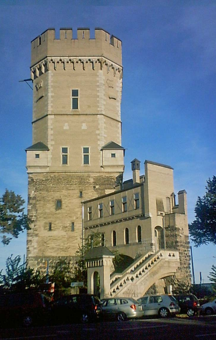 Bayenturm / Frauenmediaturm in Köln